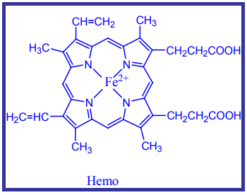 Hemo taldea